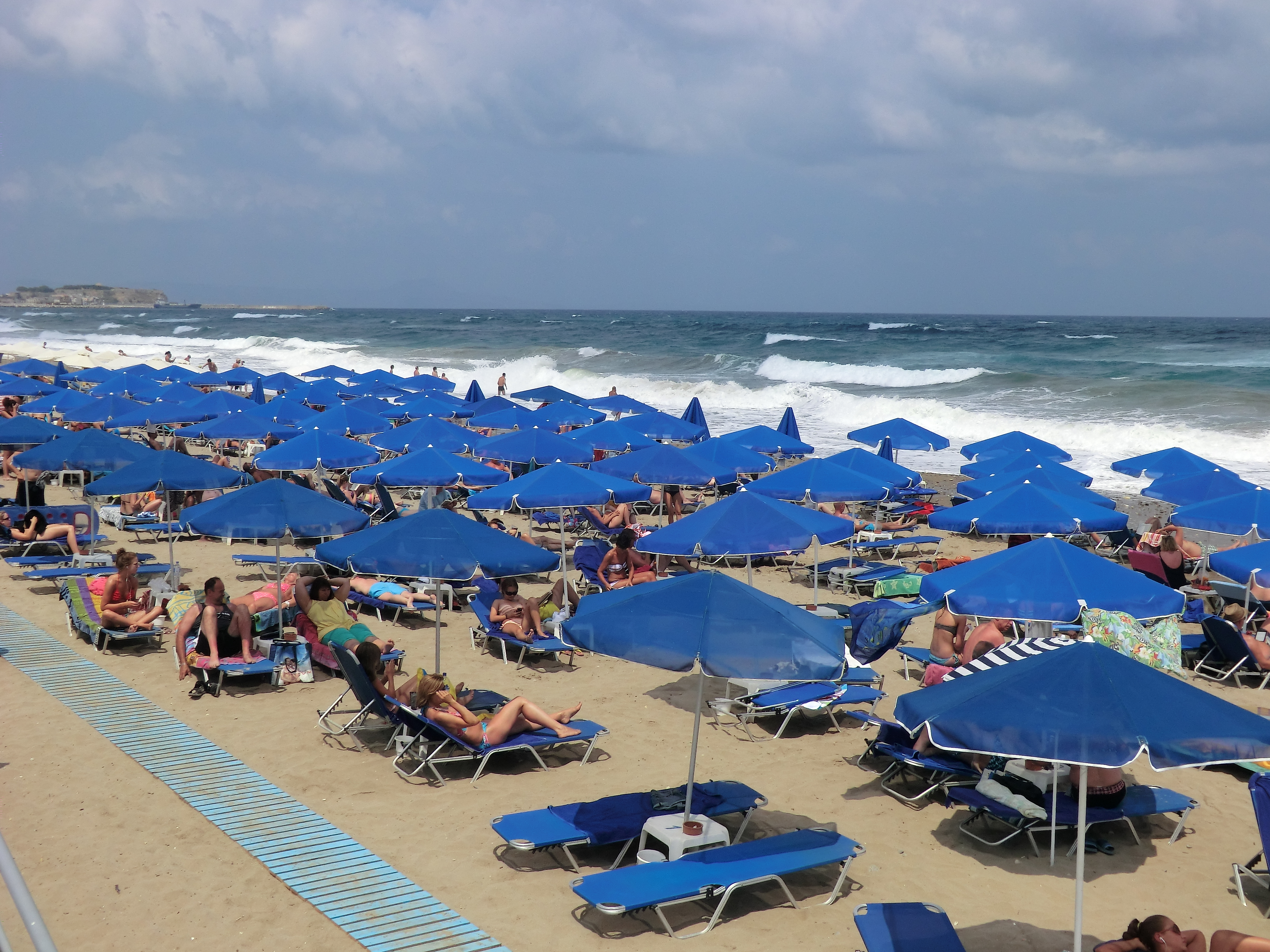 Vue de la plage de Réthymnon.